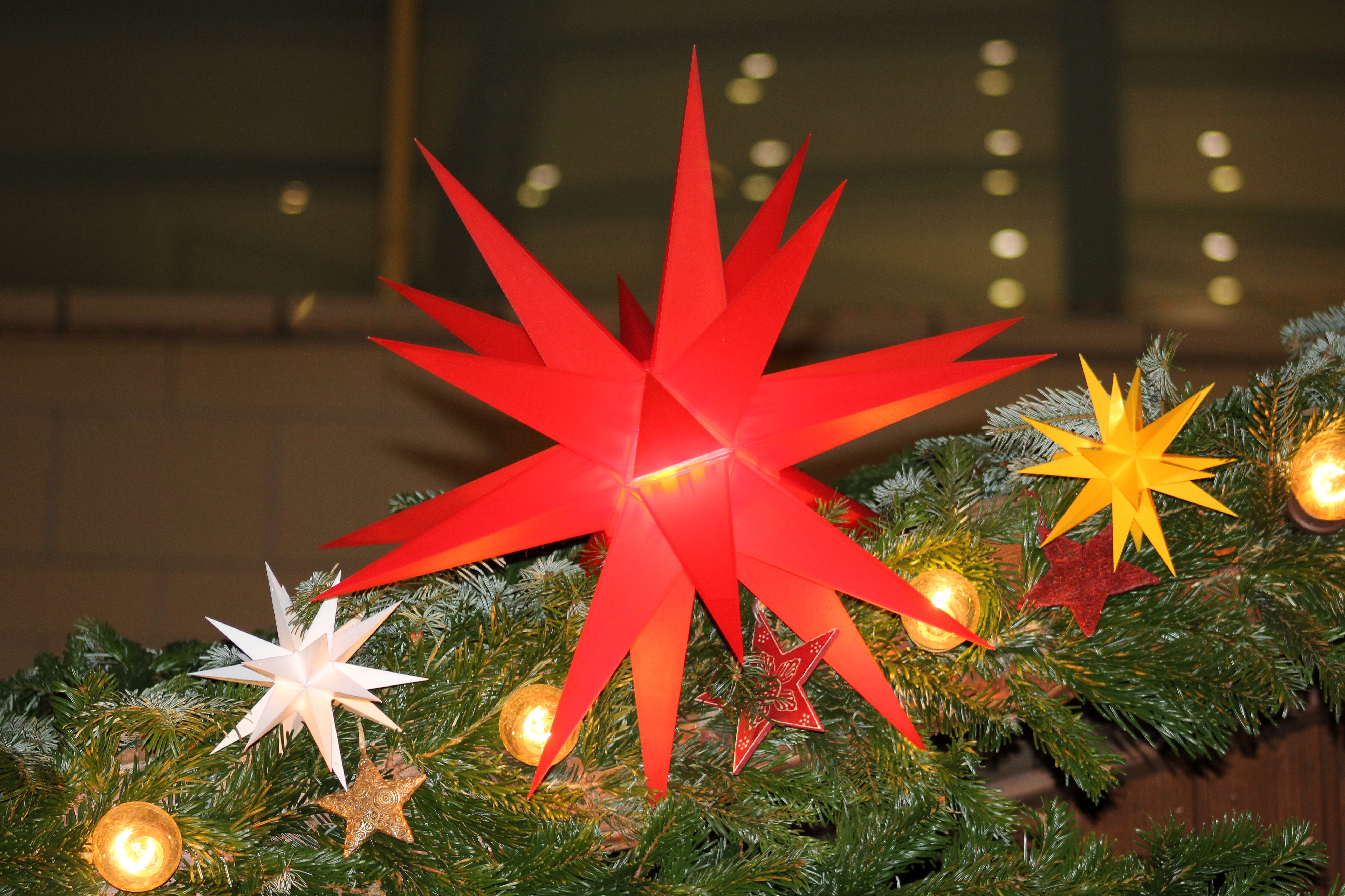 Chemnitzer Weihnachtsmarkt.